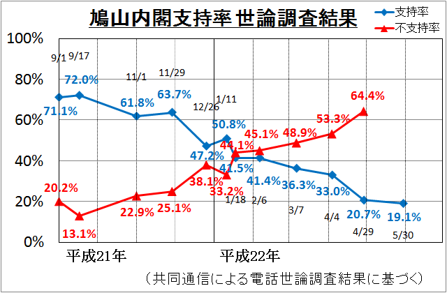 鳩山由紀夫内閣の支持率推移 2009年9月から2009年6月まで 共同通信社による電話世論調査結果 {